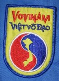 Photo de l'écusson du vovinam prise sur un Vo phuc